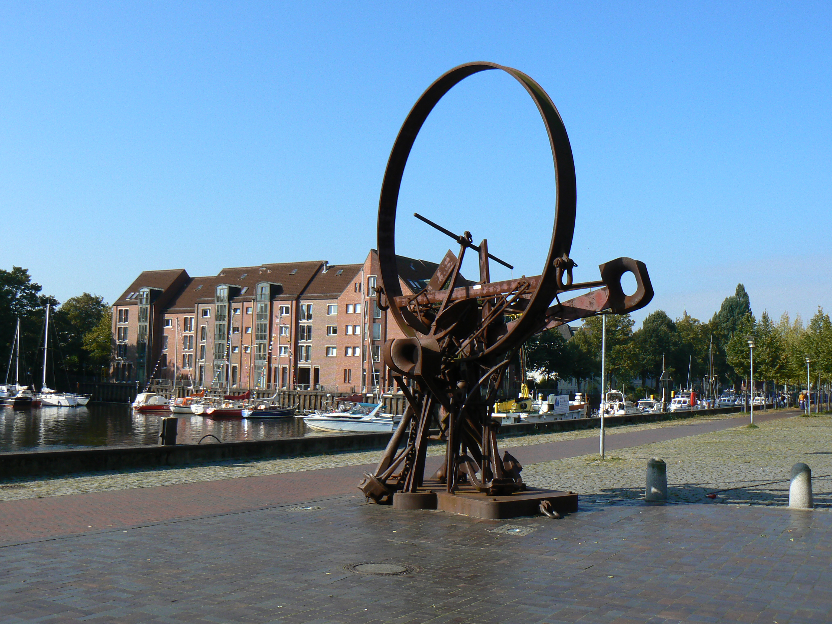 sculpture Oldenburgerring by Bernhard Luginbühl in Oldenburg/Germany